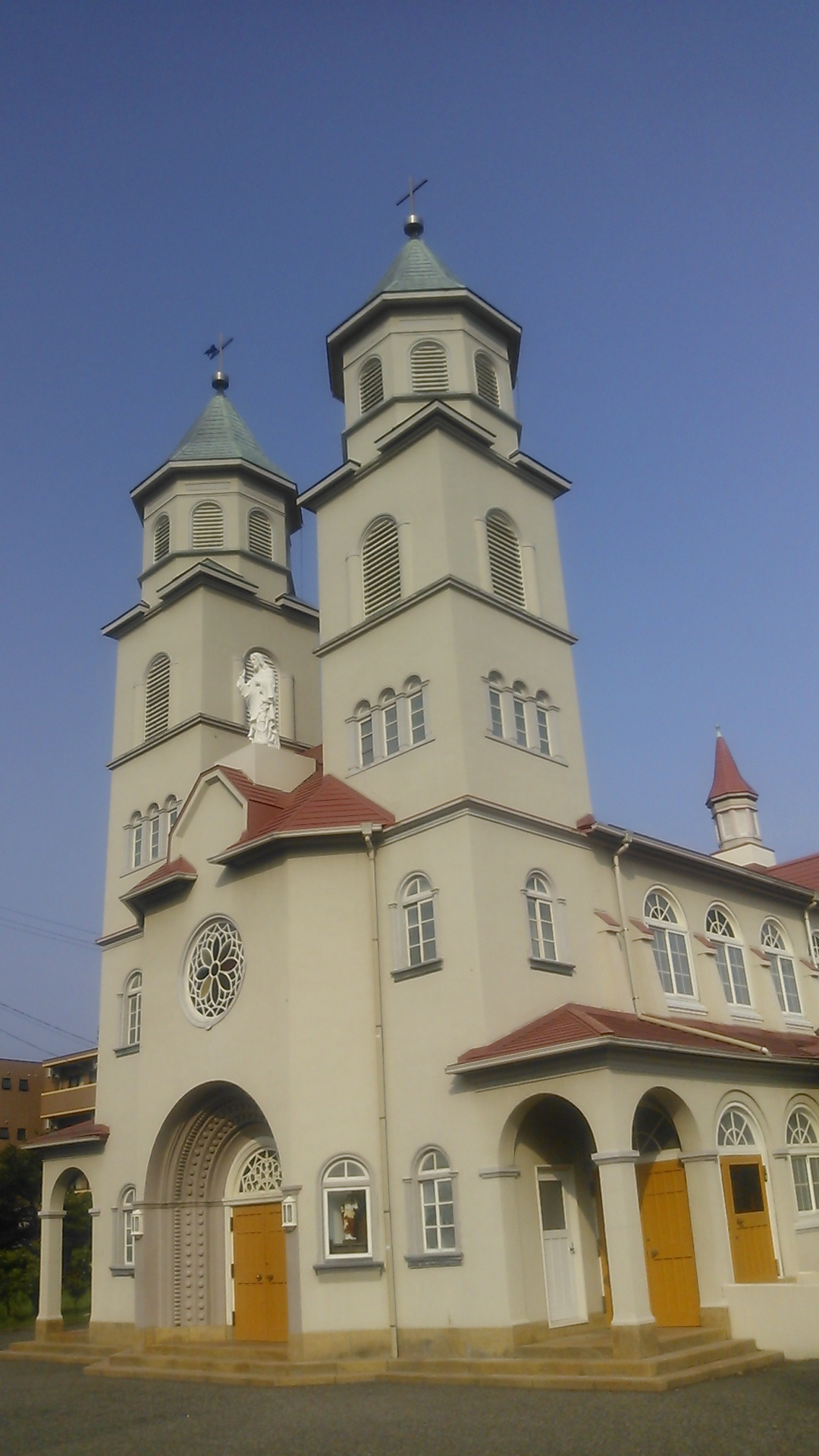 カトリック新潟教区司教座堂新潟教会